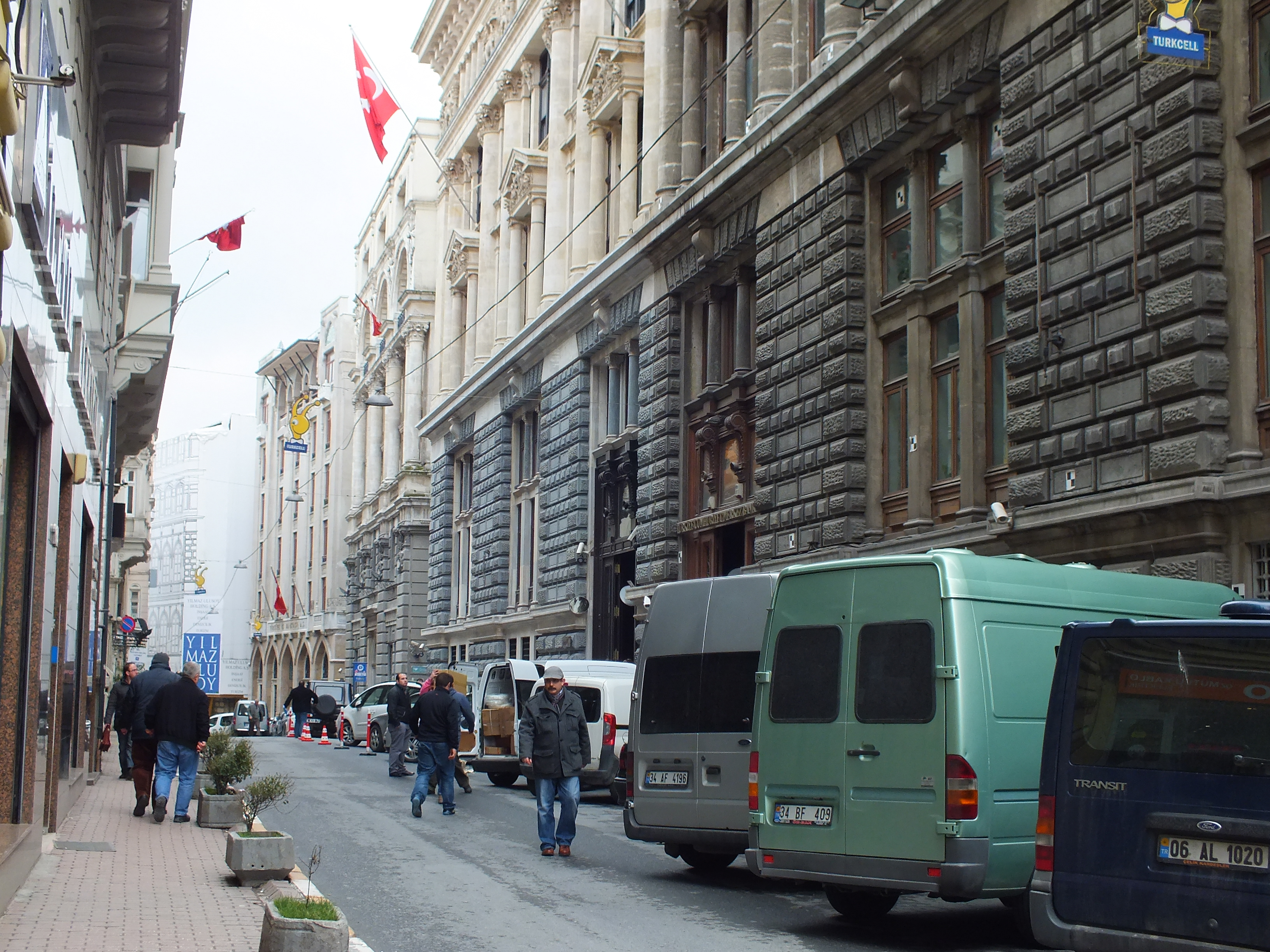 Banks street